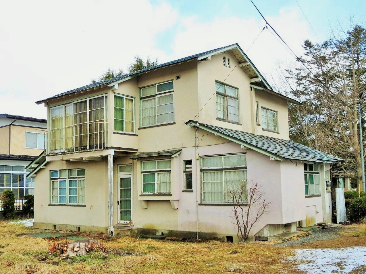 登録有形文化財 Canon IXY 3